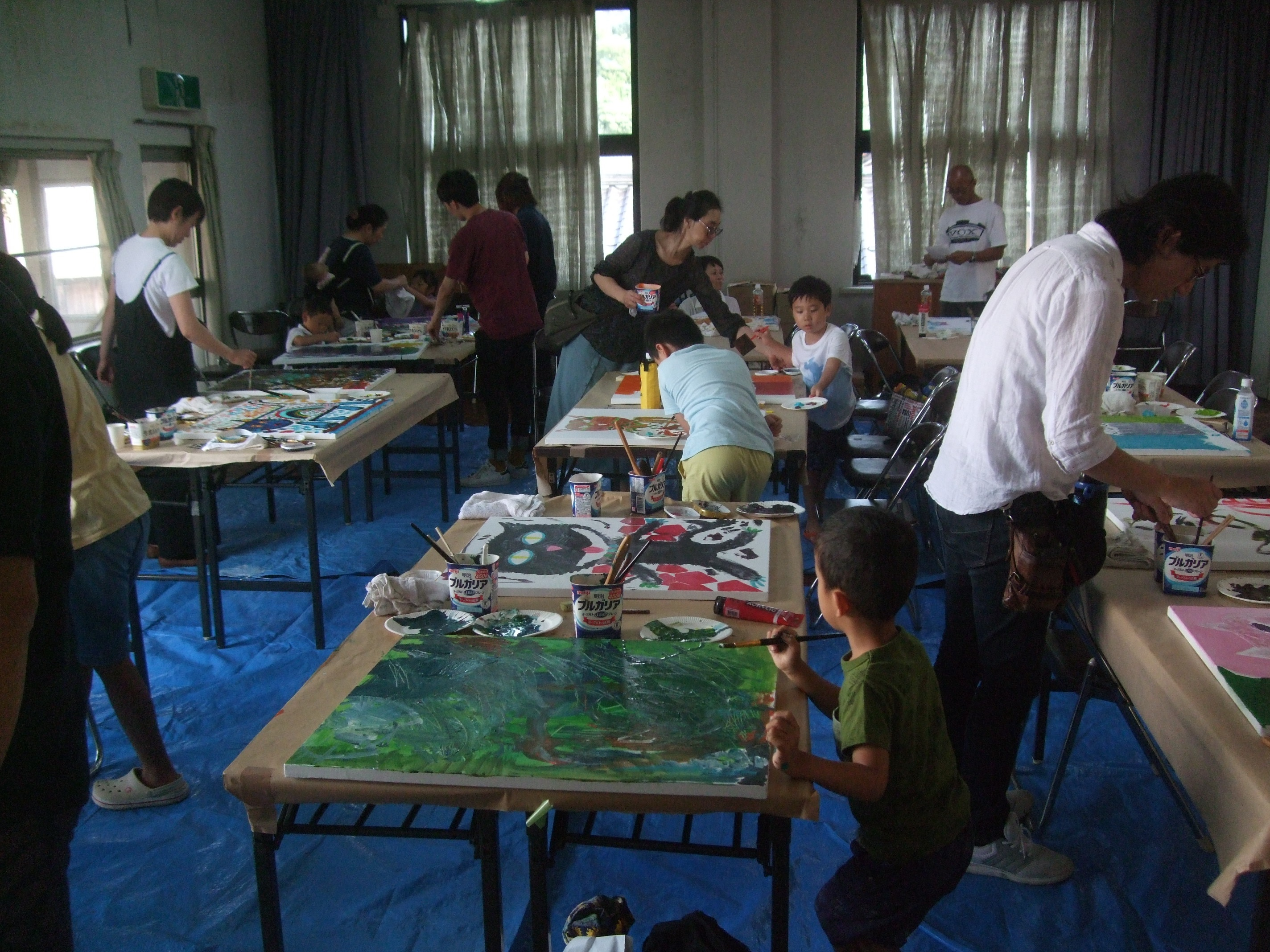 ８月２５日ヒカリ美術館主催ワークショップで子供達に絵画指導